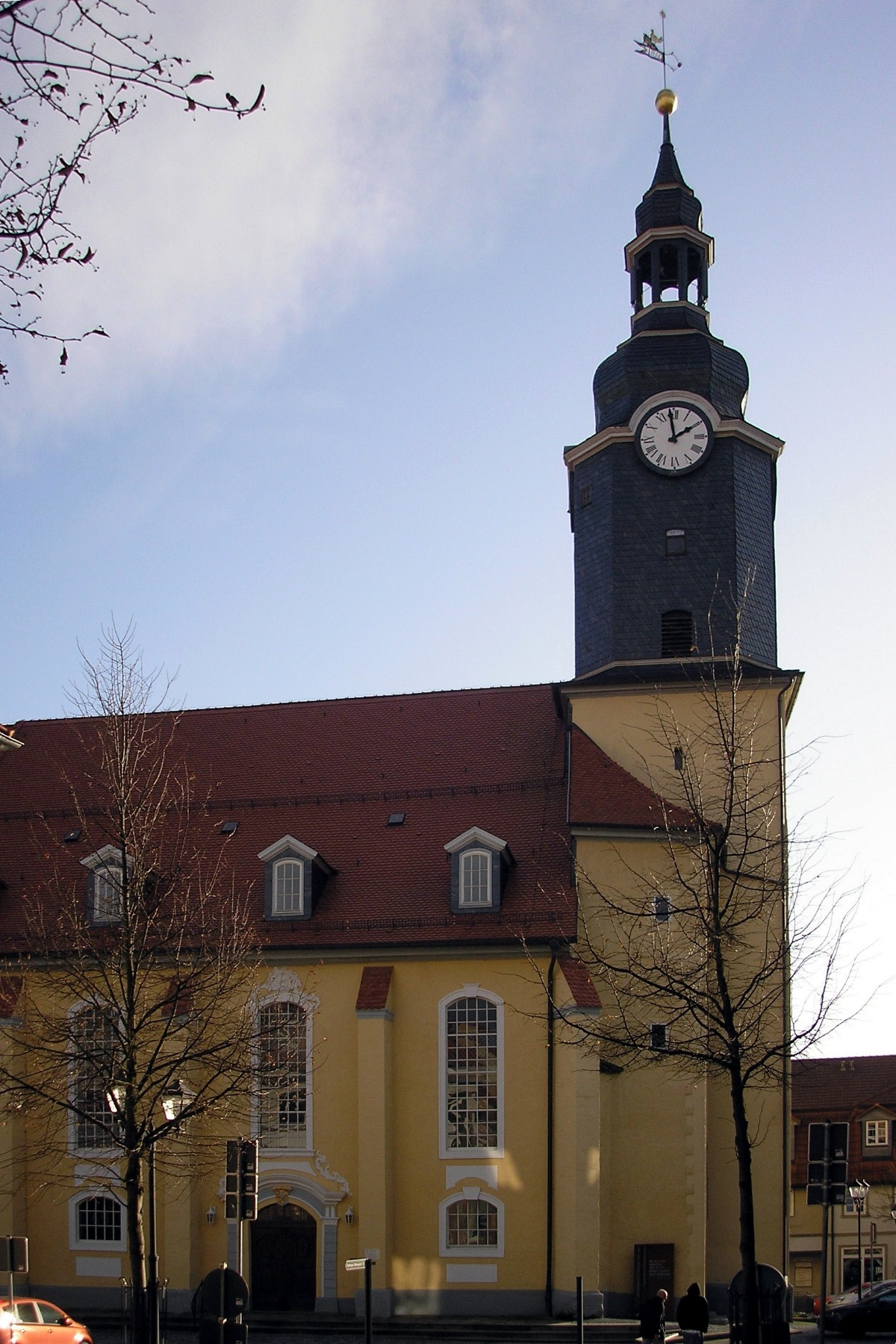 Blick durch die Markstraße zur Stadtkirche in Ilmenau (Thüringen).